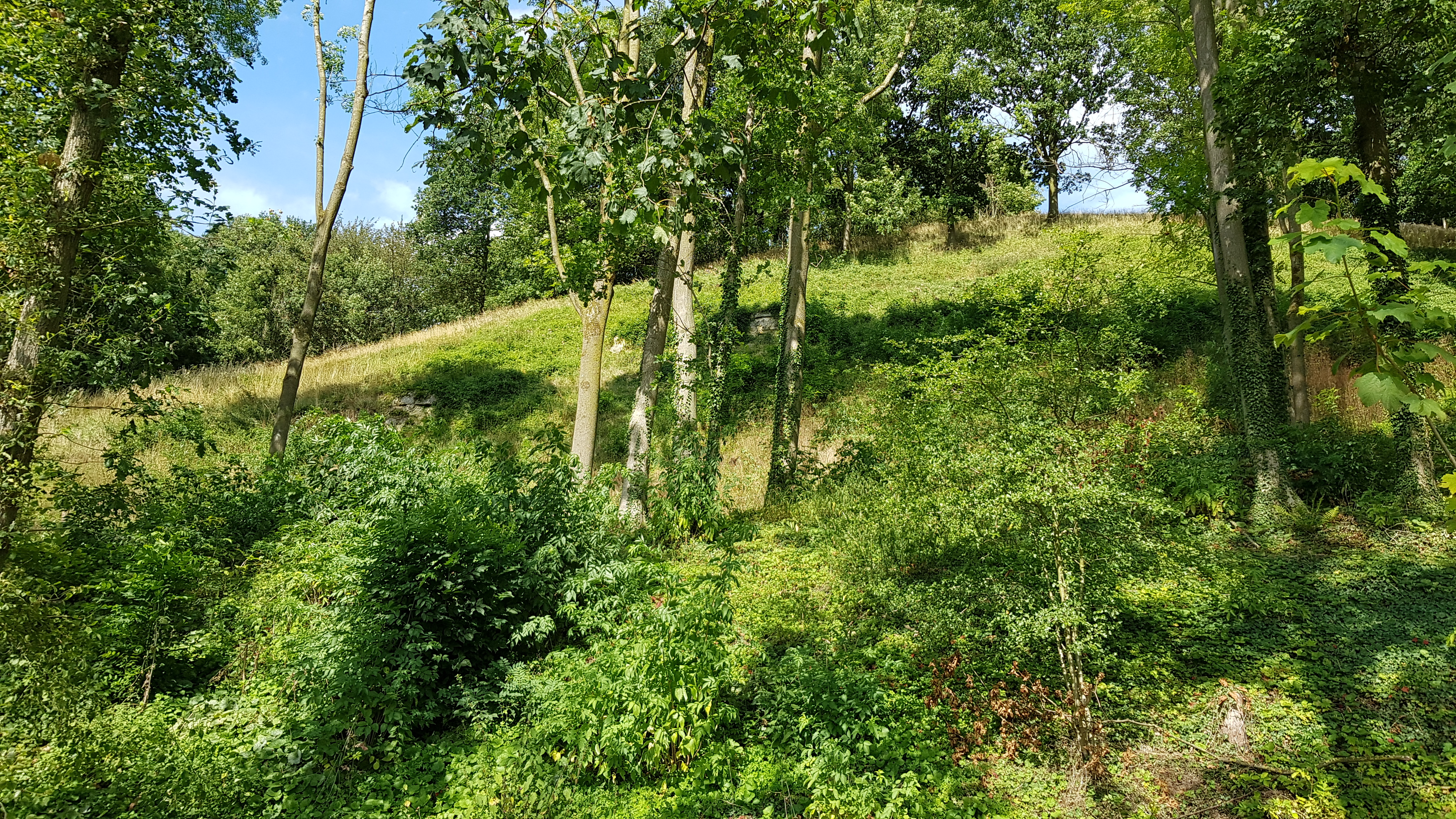 rotsen zuidzijde Schiepersberg, Cadier en Keer, Nederland